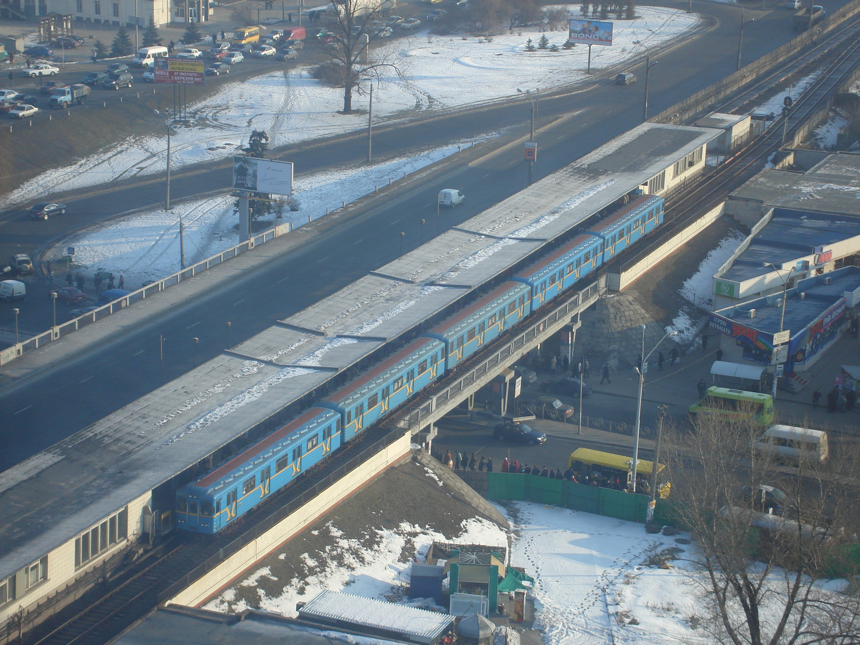 (en) Livoberezhna - a station on the Kiev Metro - view from 19th floor of Tourist Hotel (pl) Lewobrzeżna - stacja kijowskiego metra - widok z 19. piętra hotelu Tourist (ru) Левобережная - станция Киевского метрополитена (ua) Лівобережна — станція Київського метрополітену